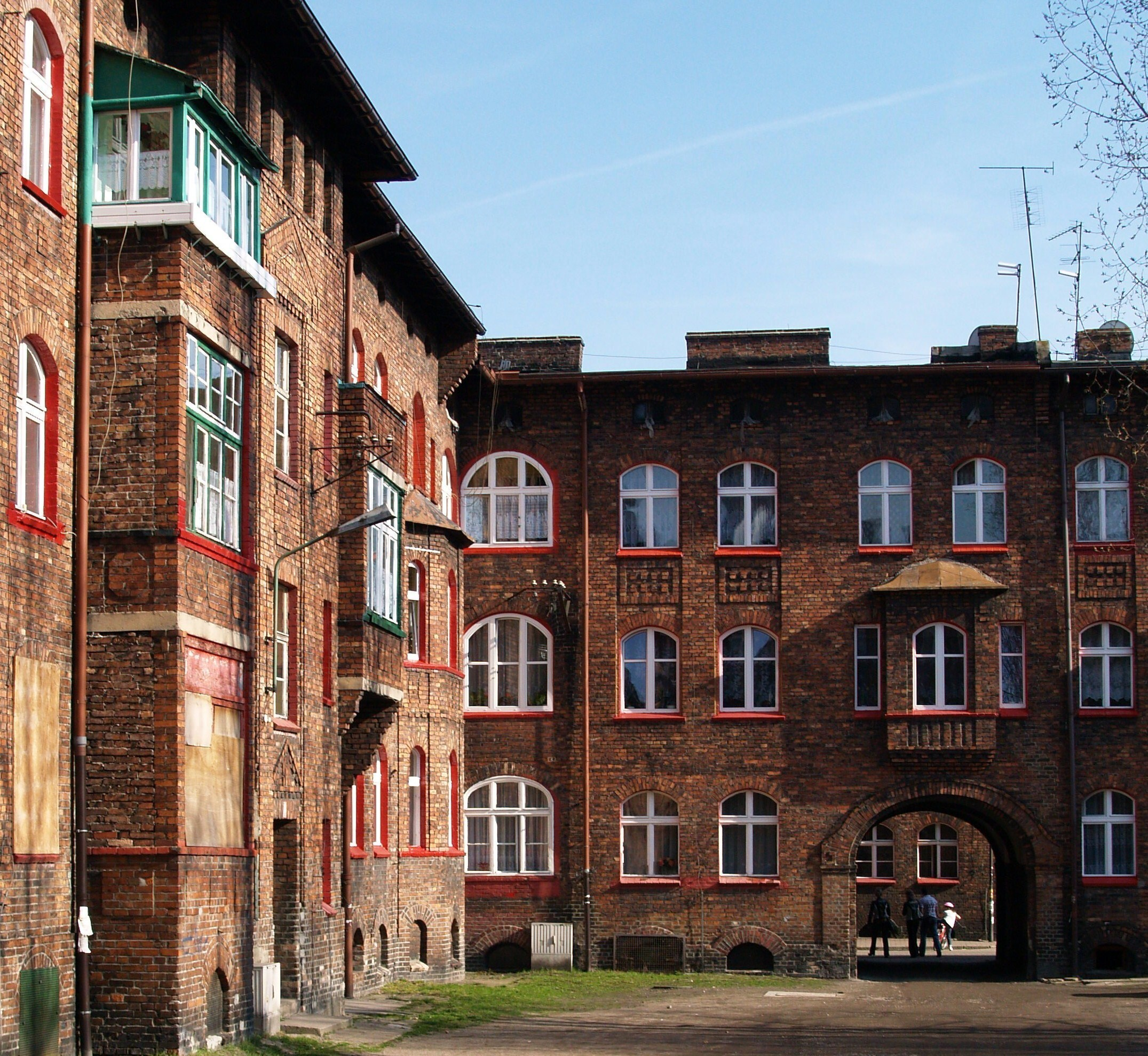 Katowice Nikiszowiec. Osiedle robotnicze, podwórze.